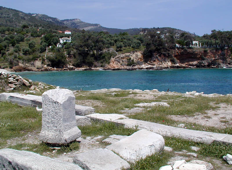 Aliki sanctuary